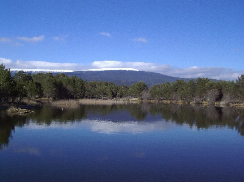 Charca de Palacios de la Sierra (Burgos - España). Se encuentra situada al norte de las Piscinas Municipales.